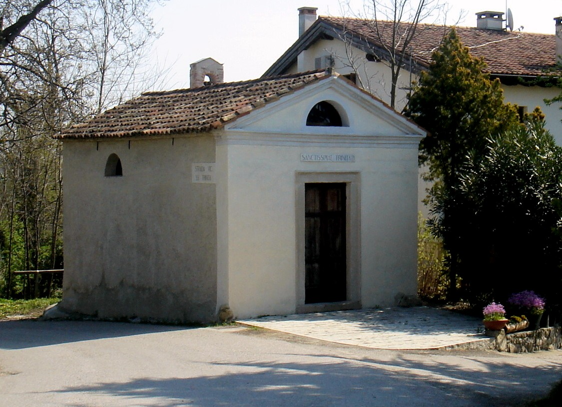 Ogliano di Conegliano (Treviso): oratorio dedicato alla Santissima Trinità.